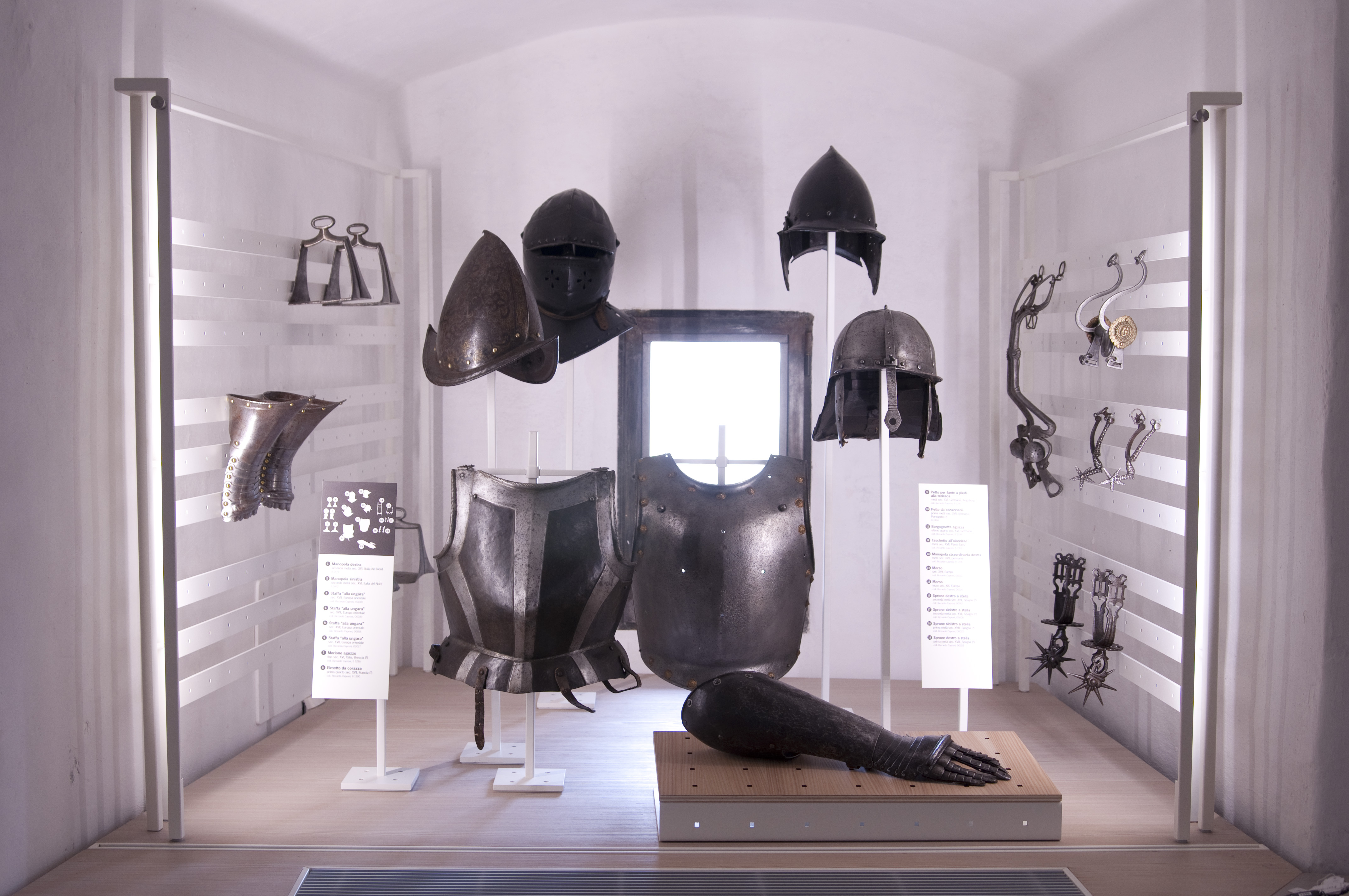 L'esposizione di armi di età moderna nel Torrione Marino del castello di Rovereto - Museo Storico Italiano della Guerra